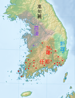 4～5世紀前半の朝鮮半島南部